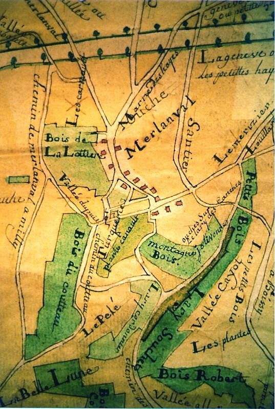 Extrait du plan de seigneurie De boissy aux cailles Zone de Mainbervilliers Deuxième moitié du XVIIIe siècle